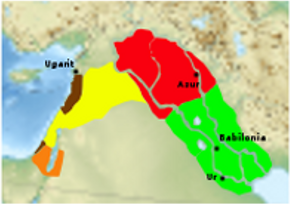 Cultures i territoris aproximats on es va fer servir la paraula El (déu, senyor): Babilònia (verd), Assíria (roig), Fenícia (marró), Canaan (groc) i Judea (taronja).